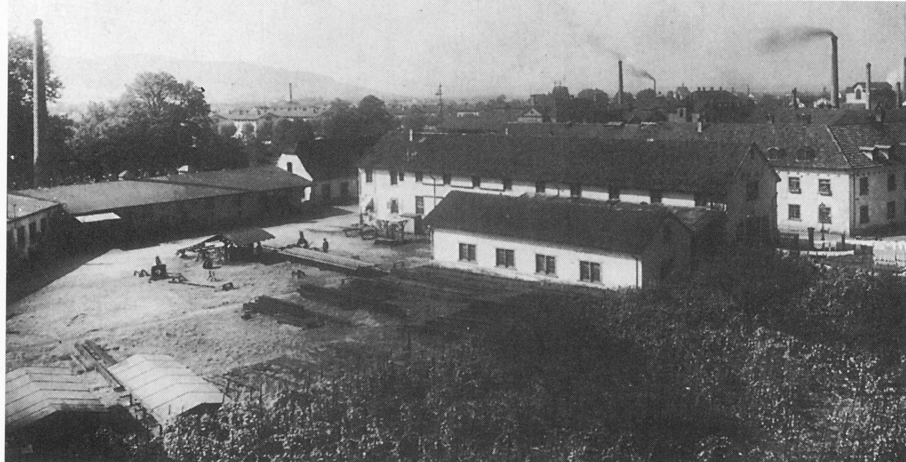 Werksanlagen der Firma Ph. Ant. Fauler in Freiburg, 1912